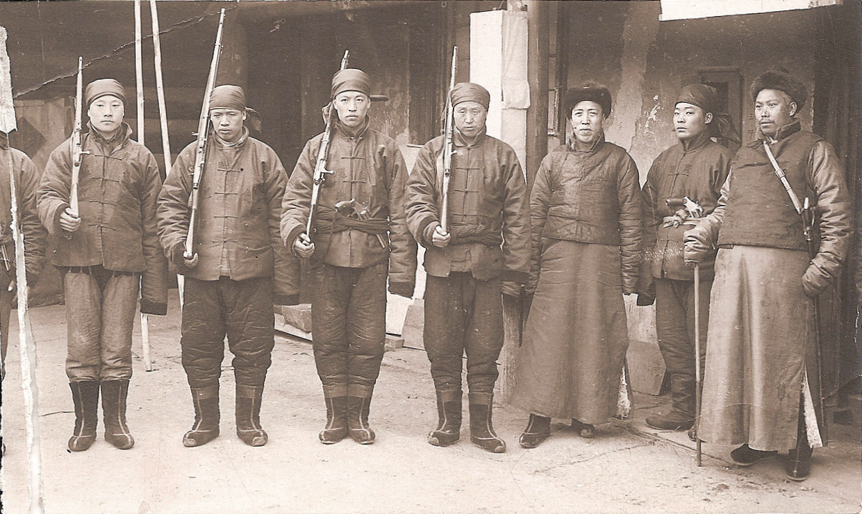 Солдаты бурят-монгольского полка 1-й Инородческой дивизии имени Его Императорского Величества Государя Михаила II